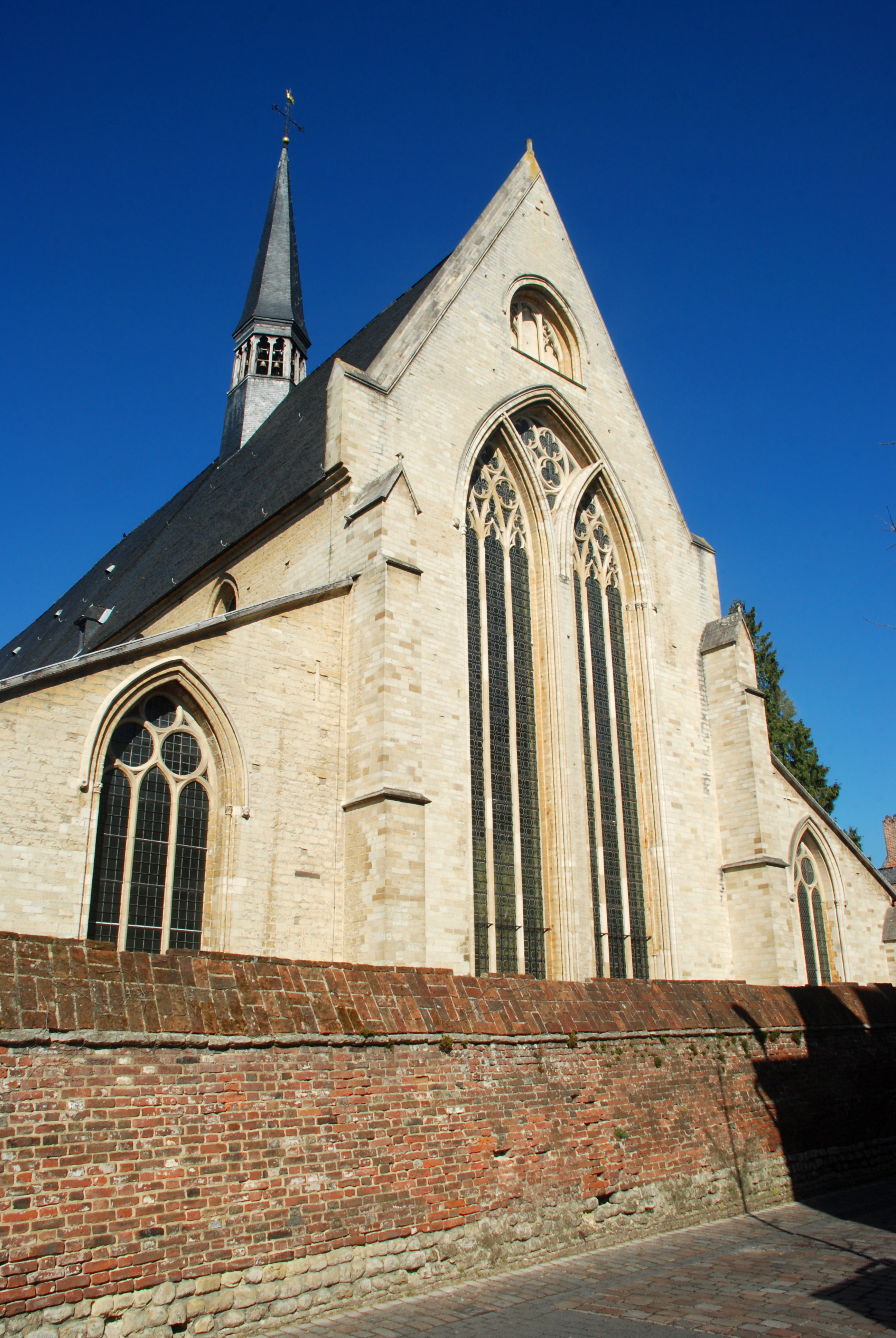 Belgique - Louvain - Église Saint-Jean-Baptiste-du-Béguinage